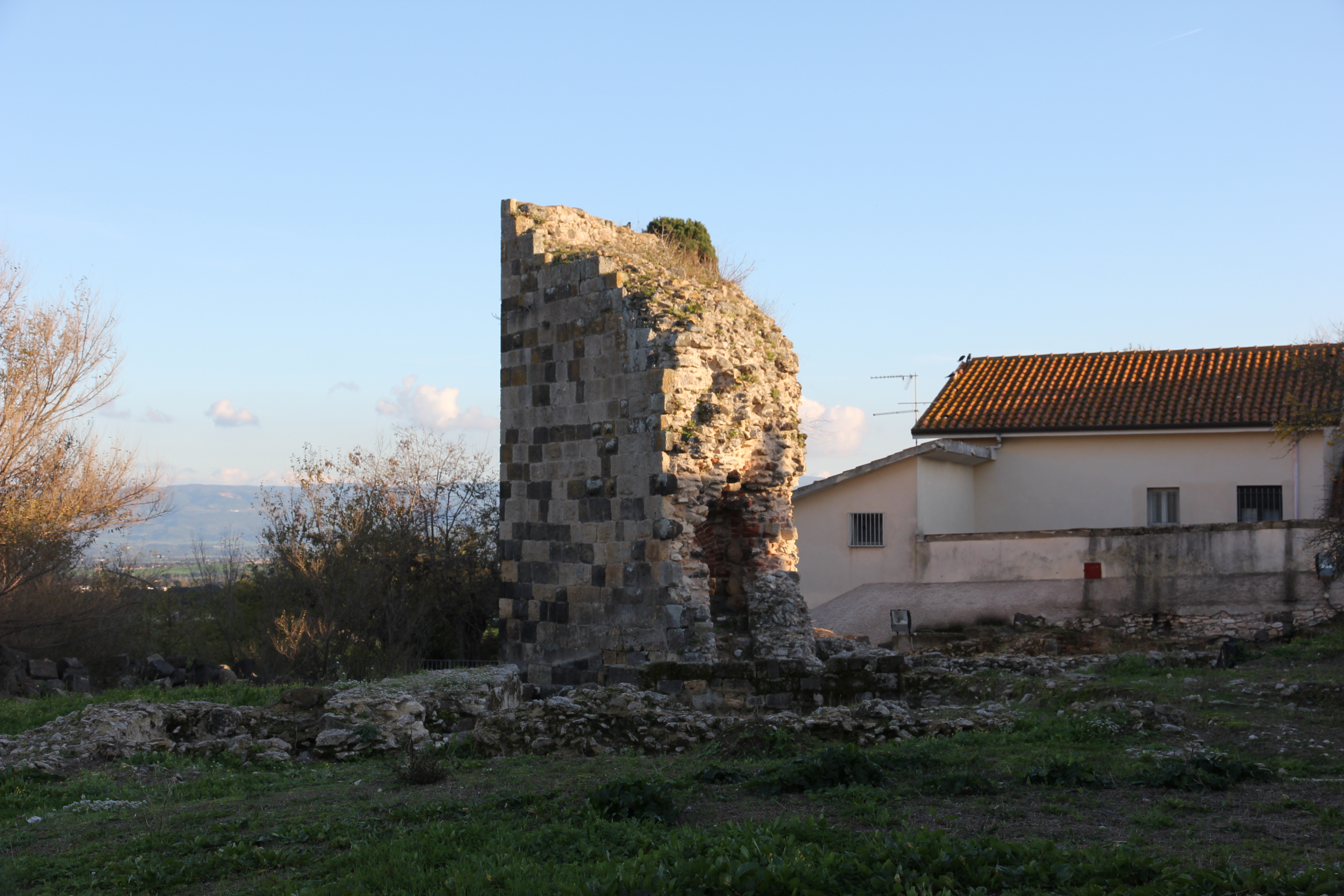 Ardara - Ruderi del castello giudicale